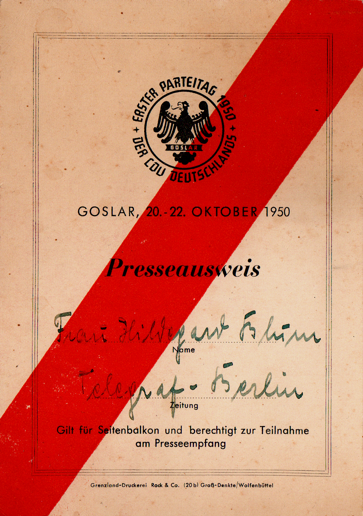 Fotoscan des ersten Presseausweises für Hildegard Blum (Telegraf Berlin) ; ausgestellt 1950)